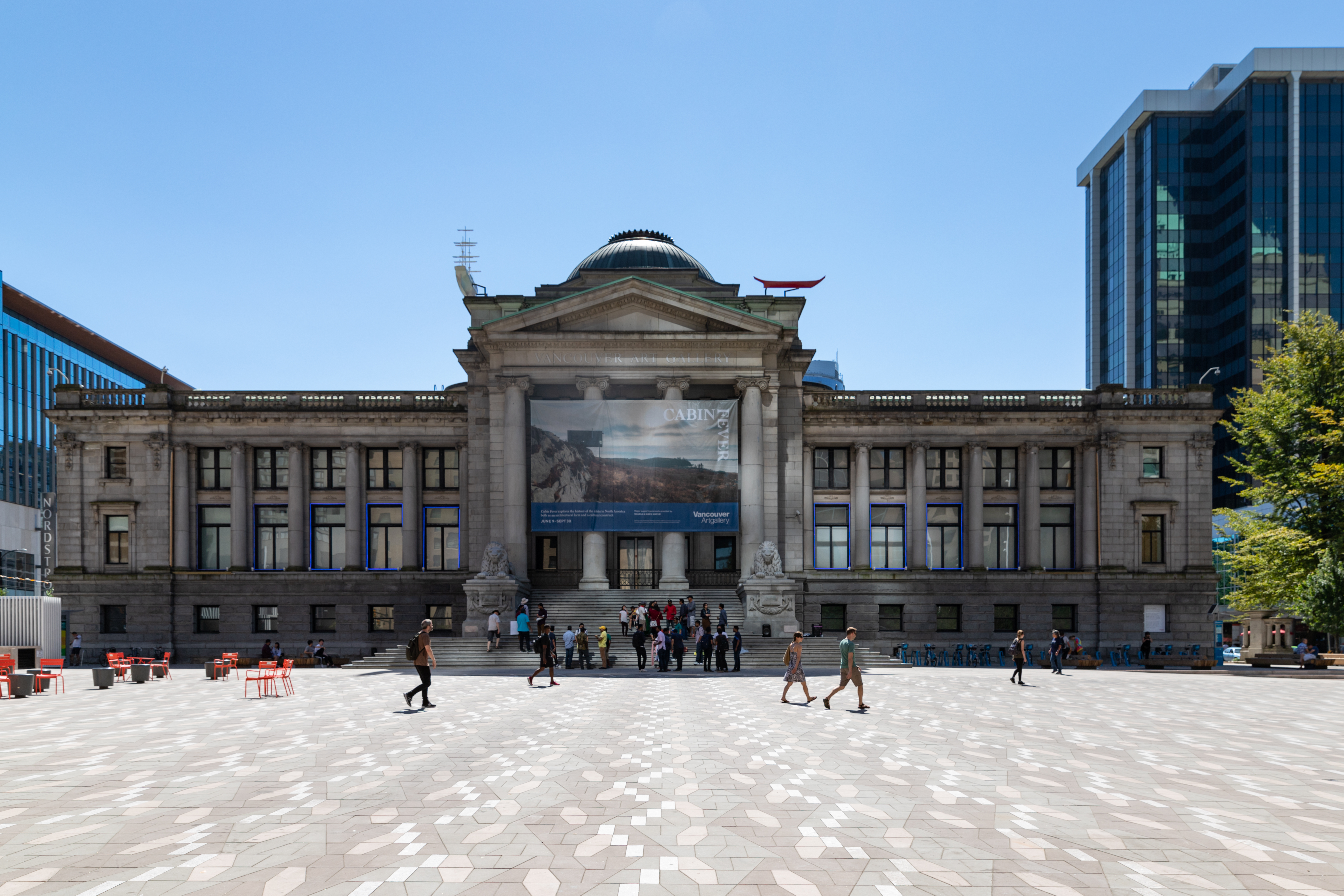 Vancouver Art Gallery